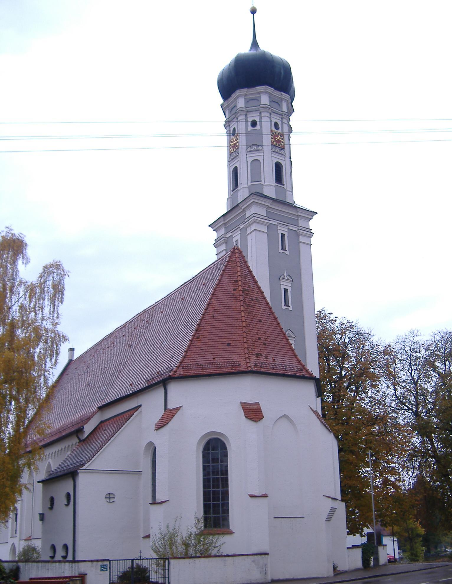 Buttenwiesen